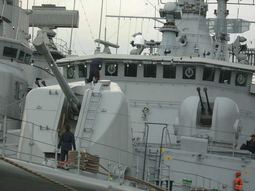 ARA Sarandí, Buenos Aires, 2010.